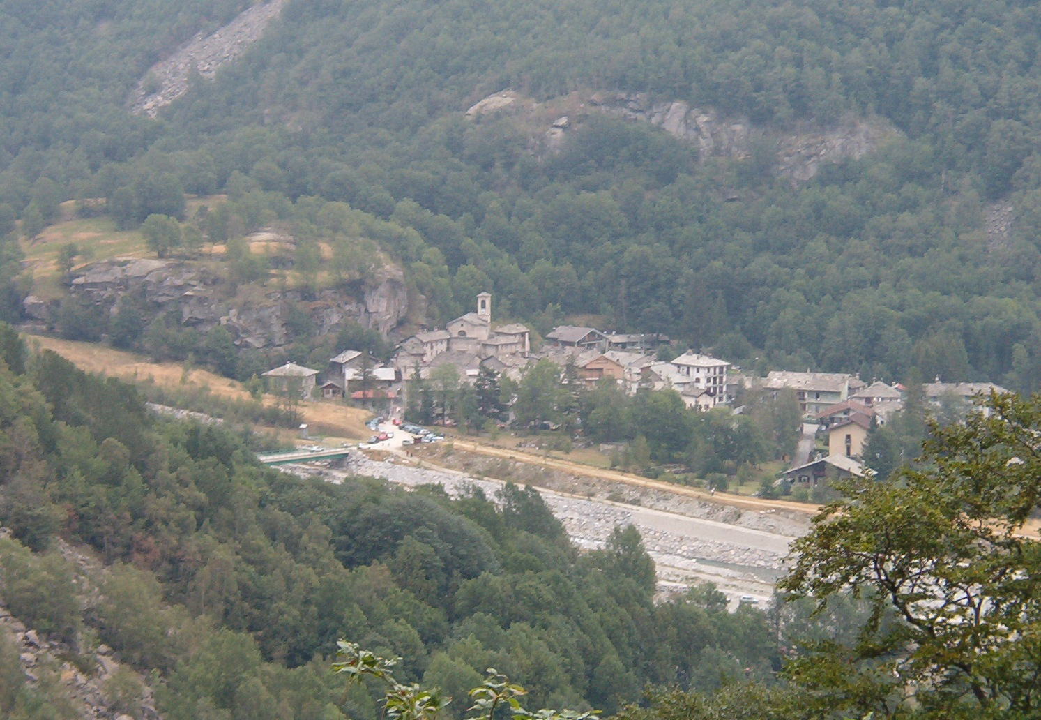 Forno Alpi Graie - comune di Groscavallo - Provincia di Torino - Piedmont - Italy